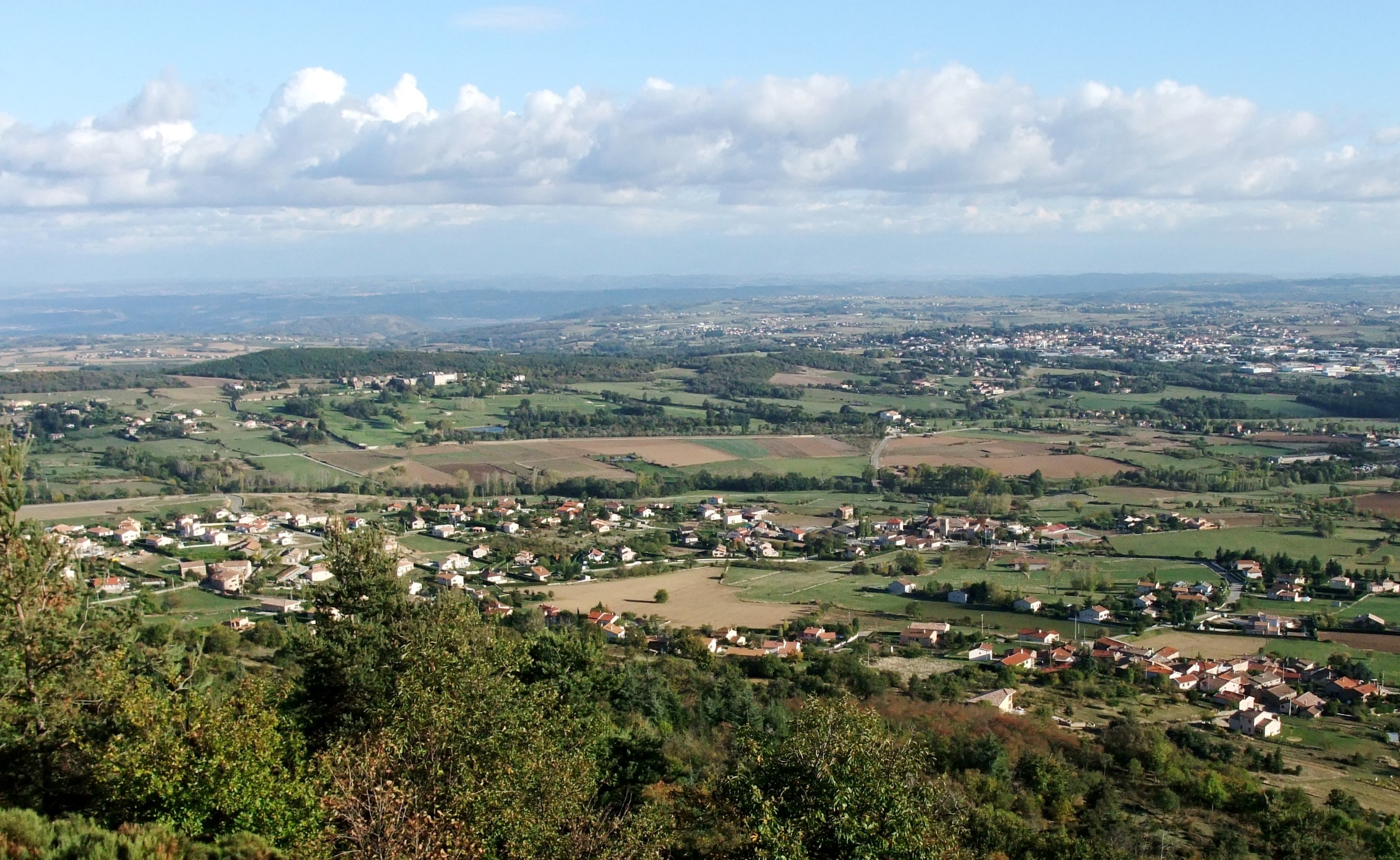 Saint-Clair (Ardèche) vue générale 2